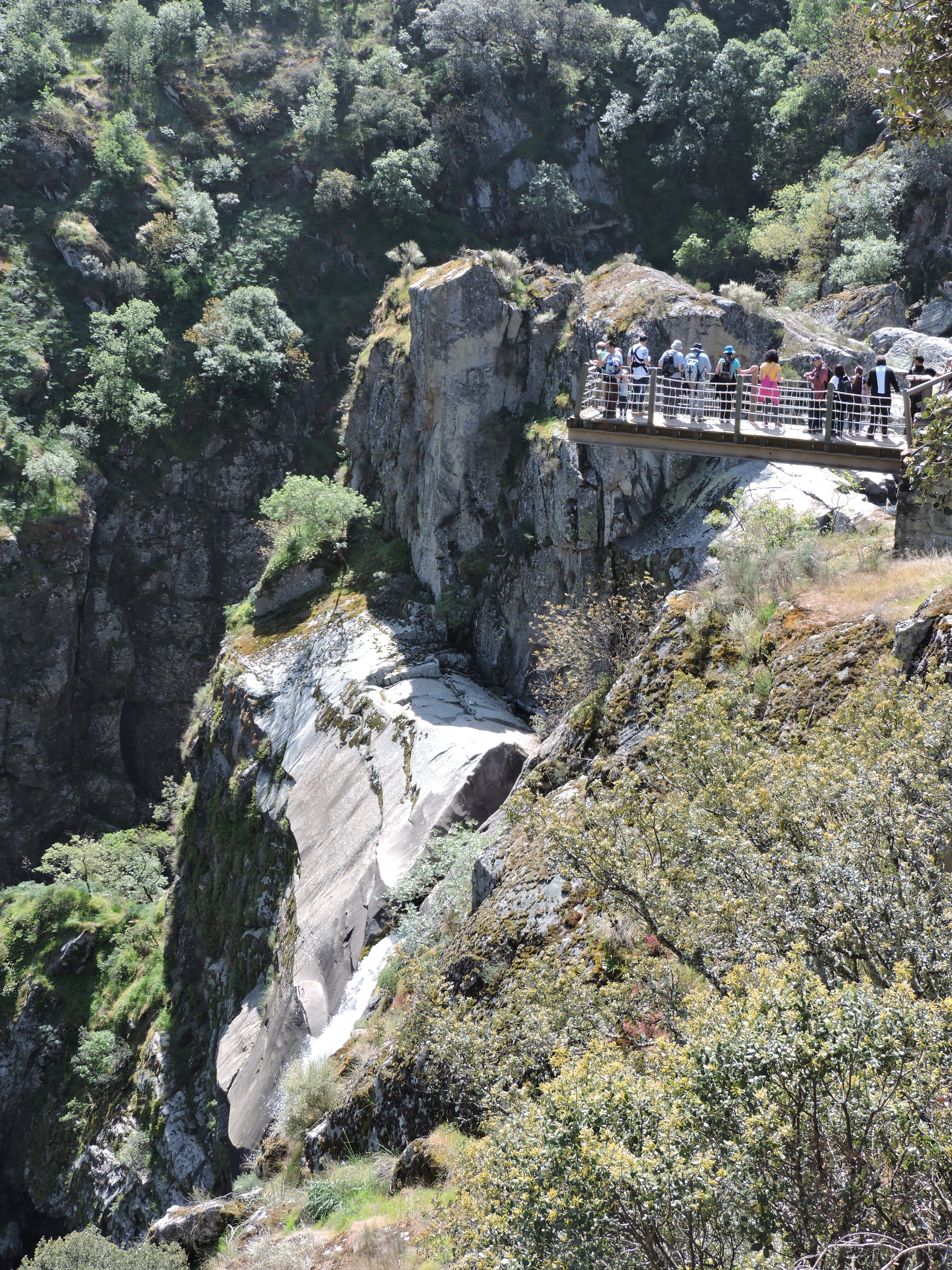 Mirador a la cascada del Pozo de los humos, dicen que frecuentada en su tiempo por Miguel de Unamuno, debe el nombre a que cuando baja con mucha agua se produce una neblina que asemeja a humo This is a photography of a Special Area of Conservation in Spain with the ID: ES4150096. Natura2000 entry, EEA entry